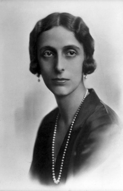 Sveriges Kronprinsessa